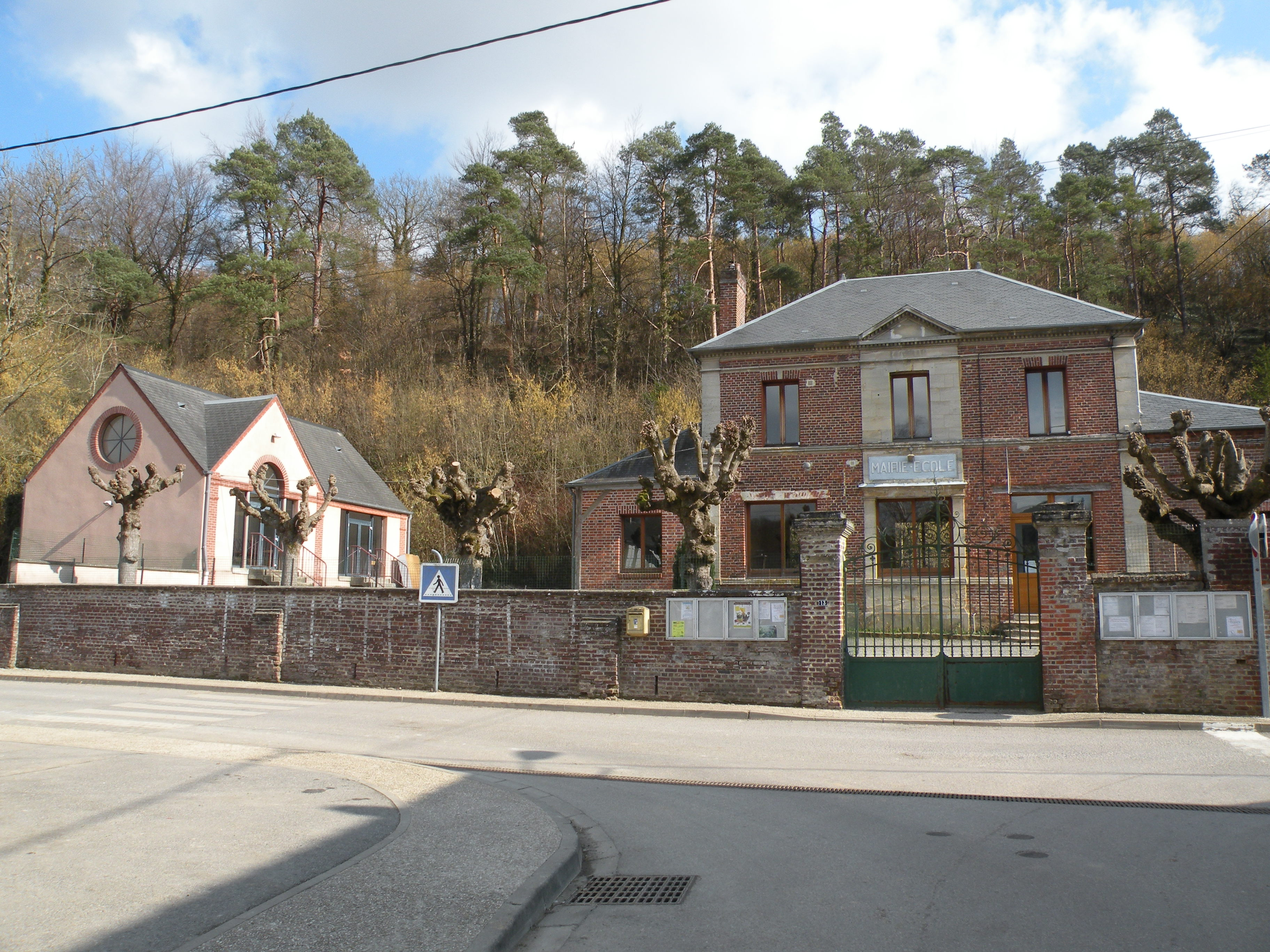 mairie et ecole de la commune de Mortefontaine-en-Thelle, Oise, France